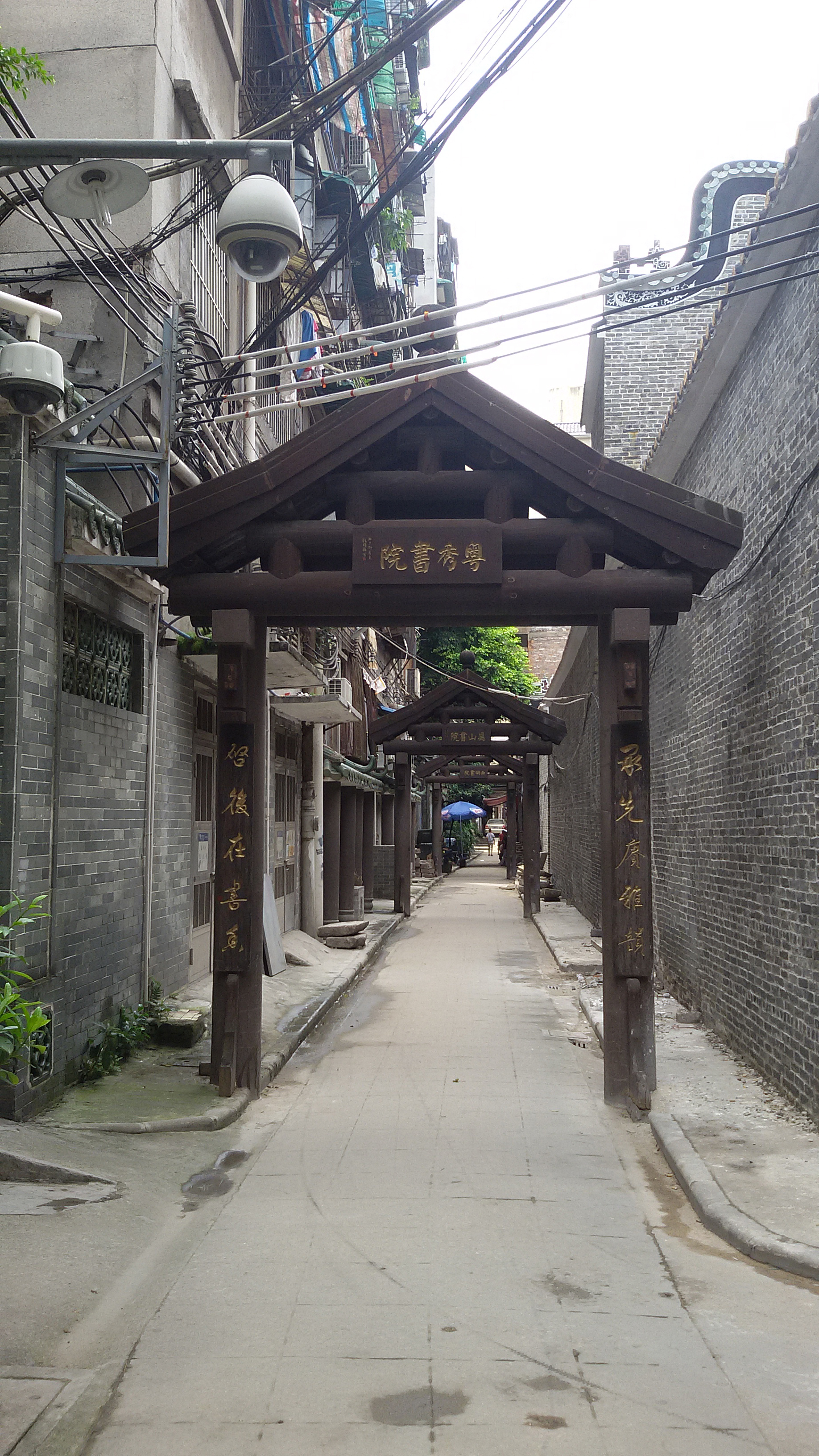 粵語: 粵秀書院嘅牌坊